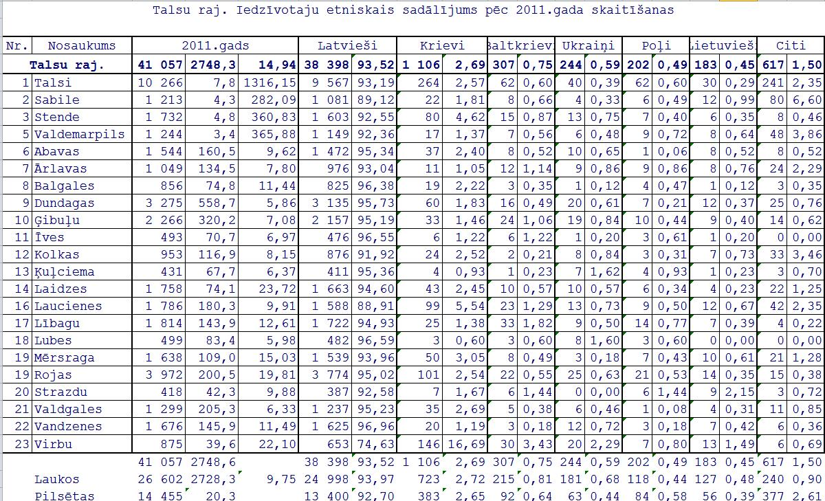 Latvijas 2011 gada tautas skaitīšanas dati